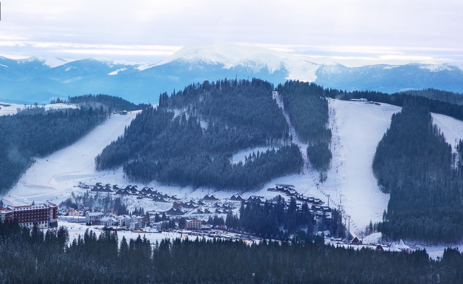 Вид на территорию курорта Буковель с г. Довга